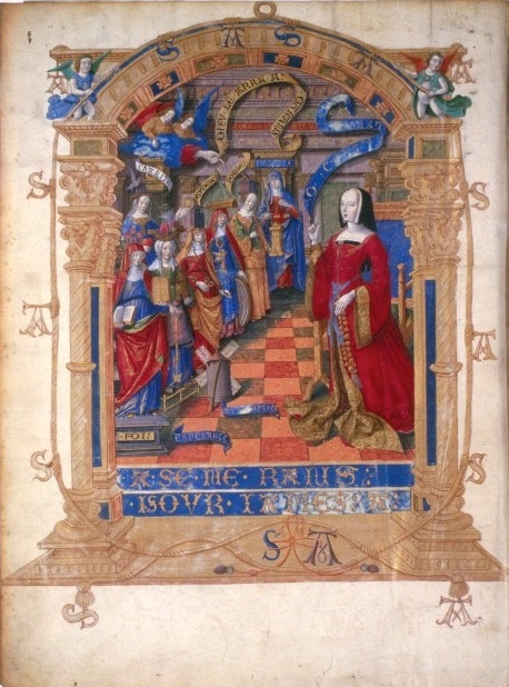 Frontispice Histoire de la Toison d'or BnF-Fr138-f1 Maître de la Chronique scandaleuse